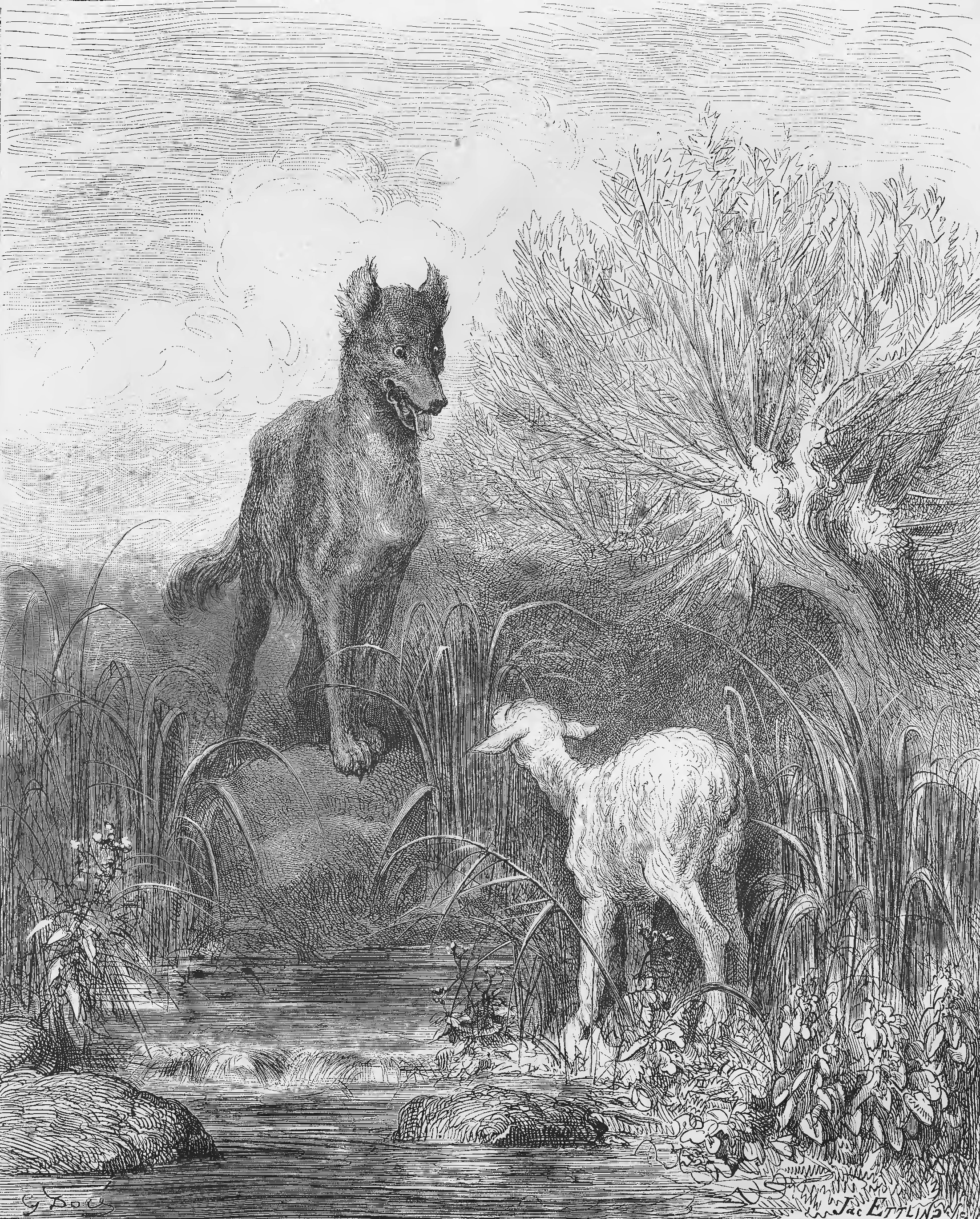 grafika z książki PL publikacja: Nakładem i drukiem Jana Noskowskiego, Warszawa 1876